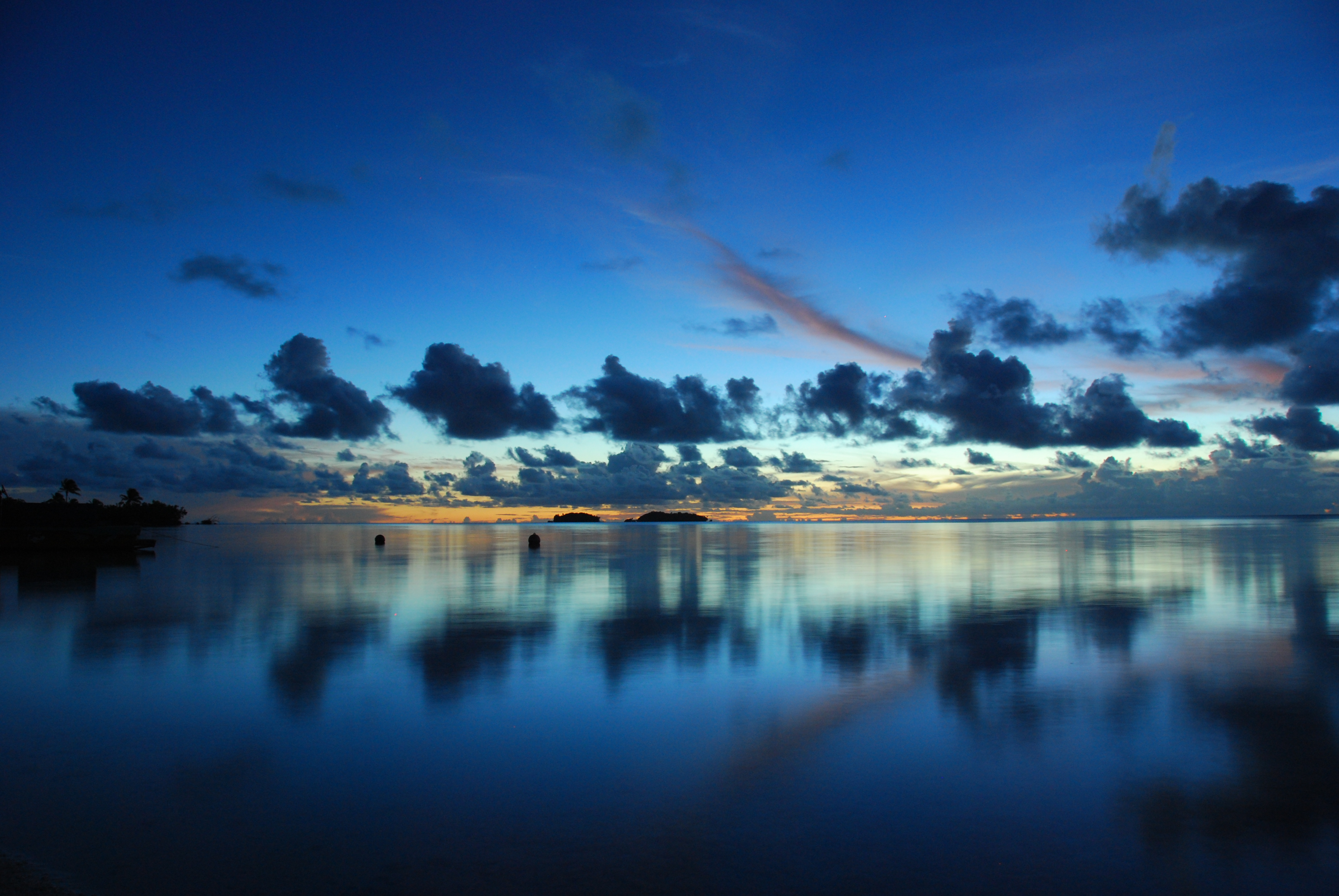 Sunset from Akaiami, Cook islands